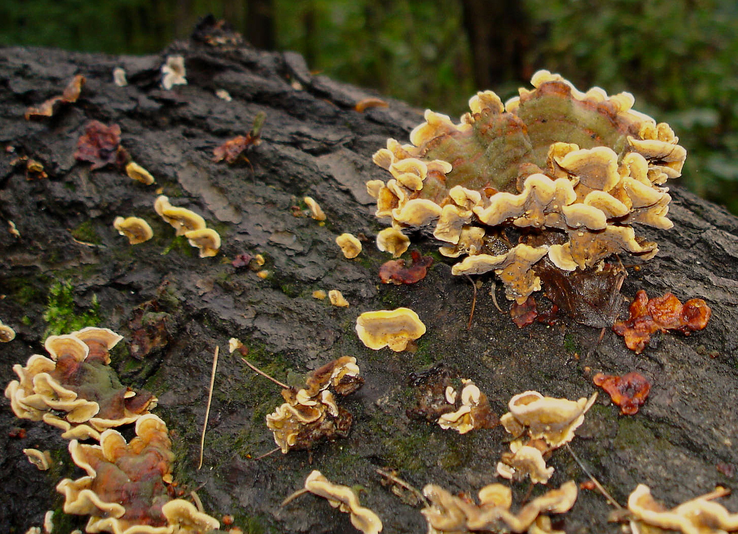 Striegeliger oder Zottiger Schichtpilz (Stereum hirsutum)